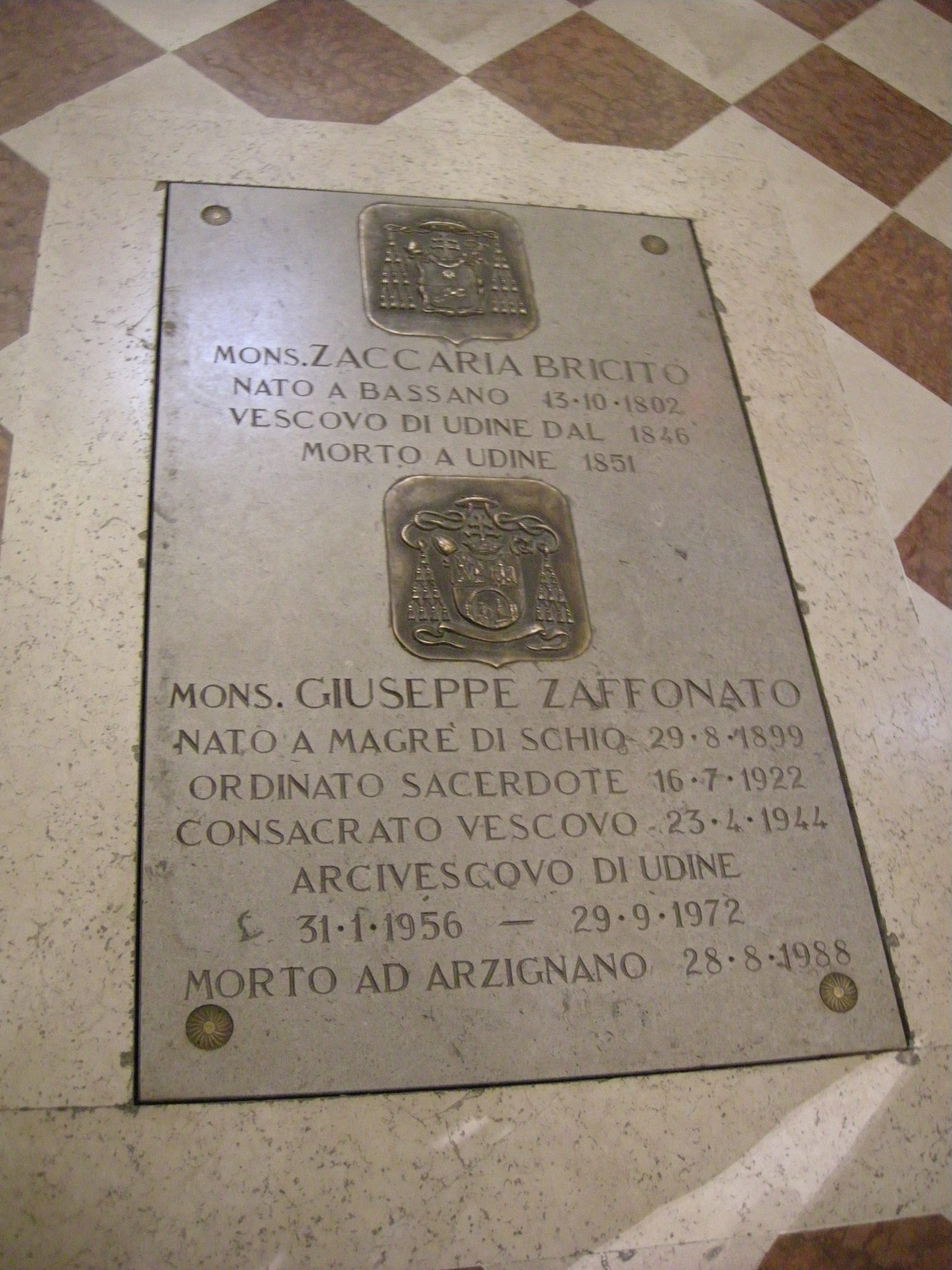 Duomo di udine, altare transetto dx 05 tomba zaccaria bricito e giuseppe zaffonato